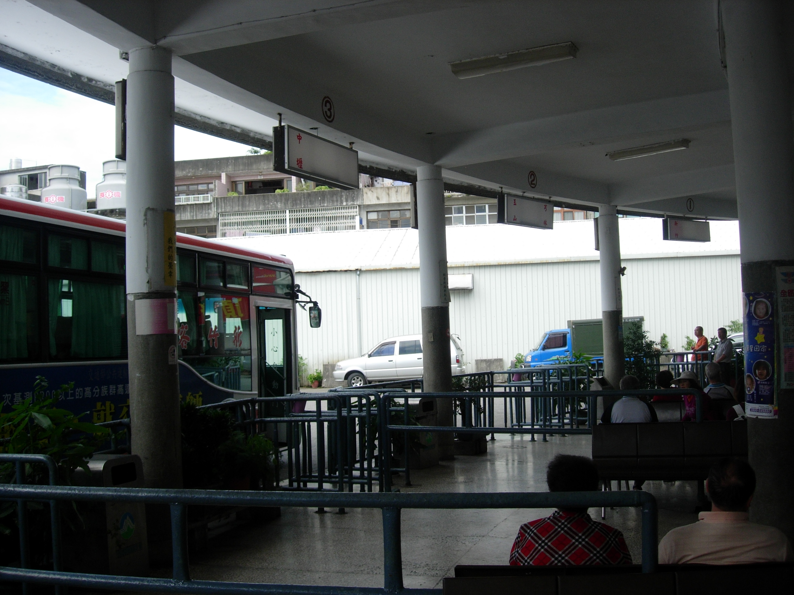 中文（台灣）: 新竹客運關西站月台1